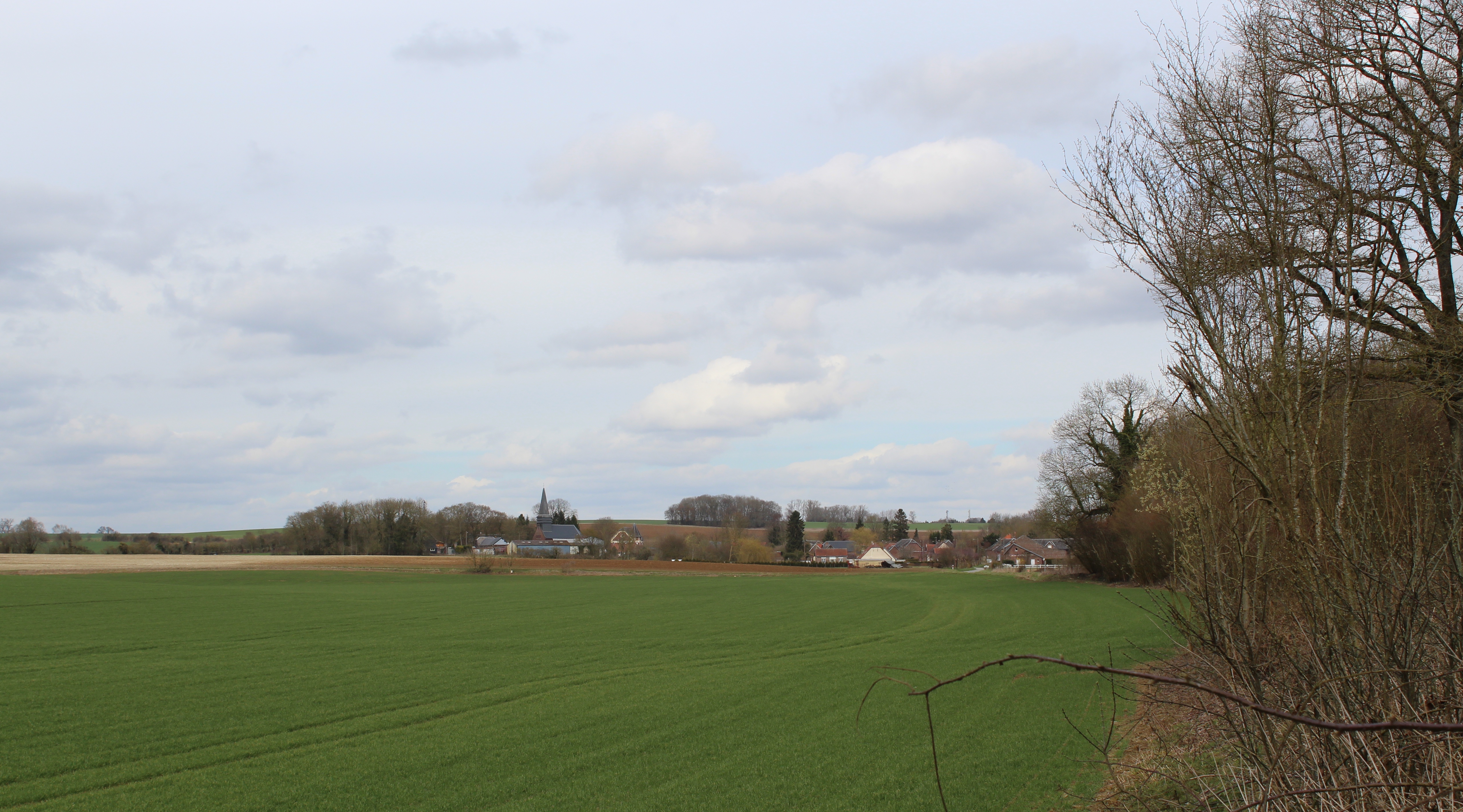 Panorama du village.